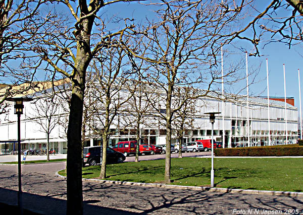 Musikhuset i Århus